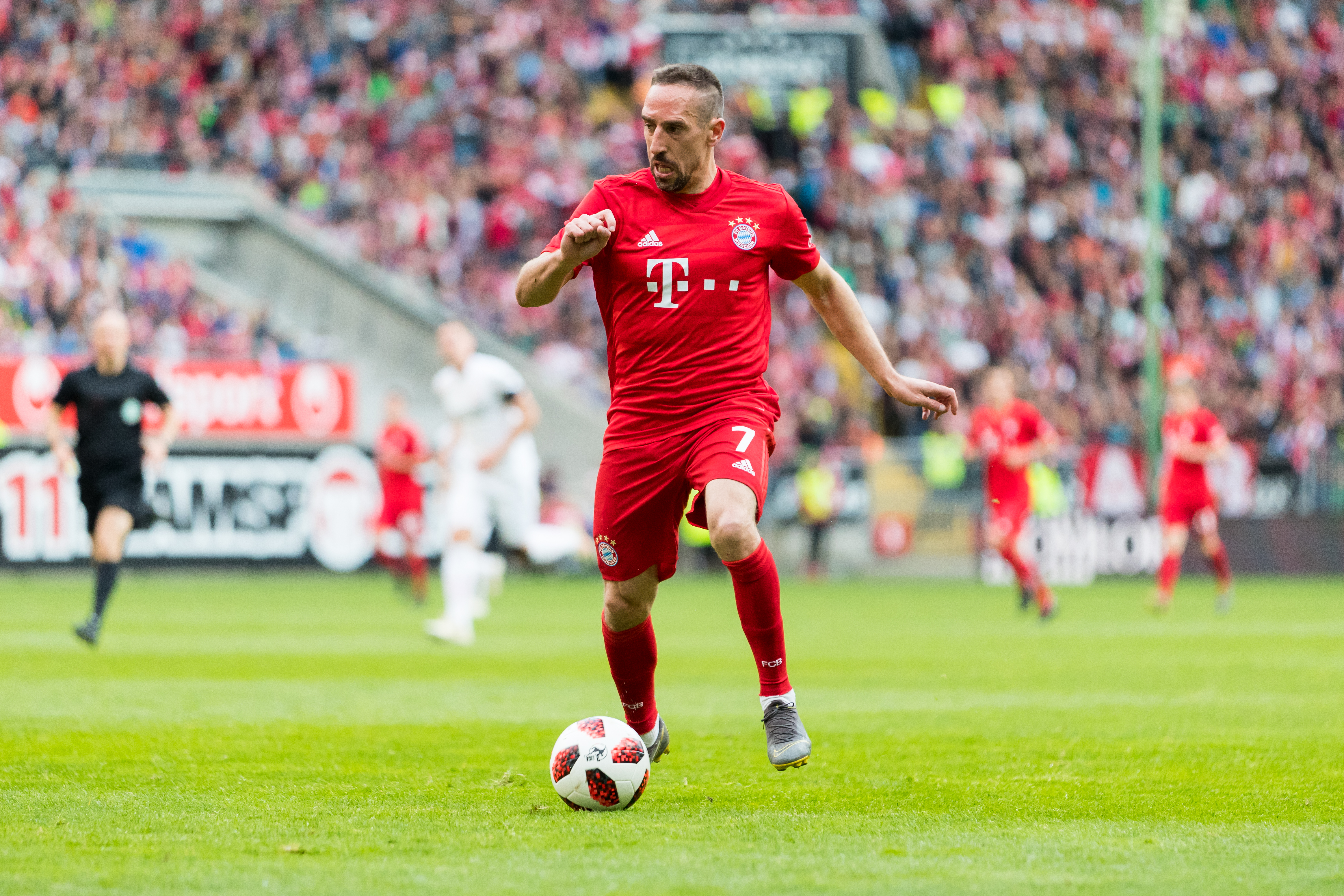 during 1.FC Kaiserslautern vs FC Bayern München at Fritz-Walter-Stadion, Kaiserslautern, Rheinland-Pfalz, Germany on 2019-05-27, Photo: Sven Mandel